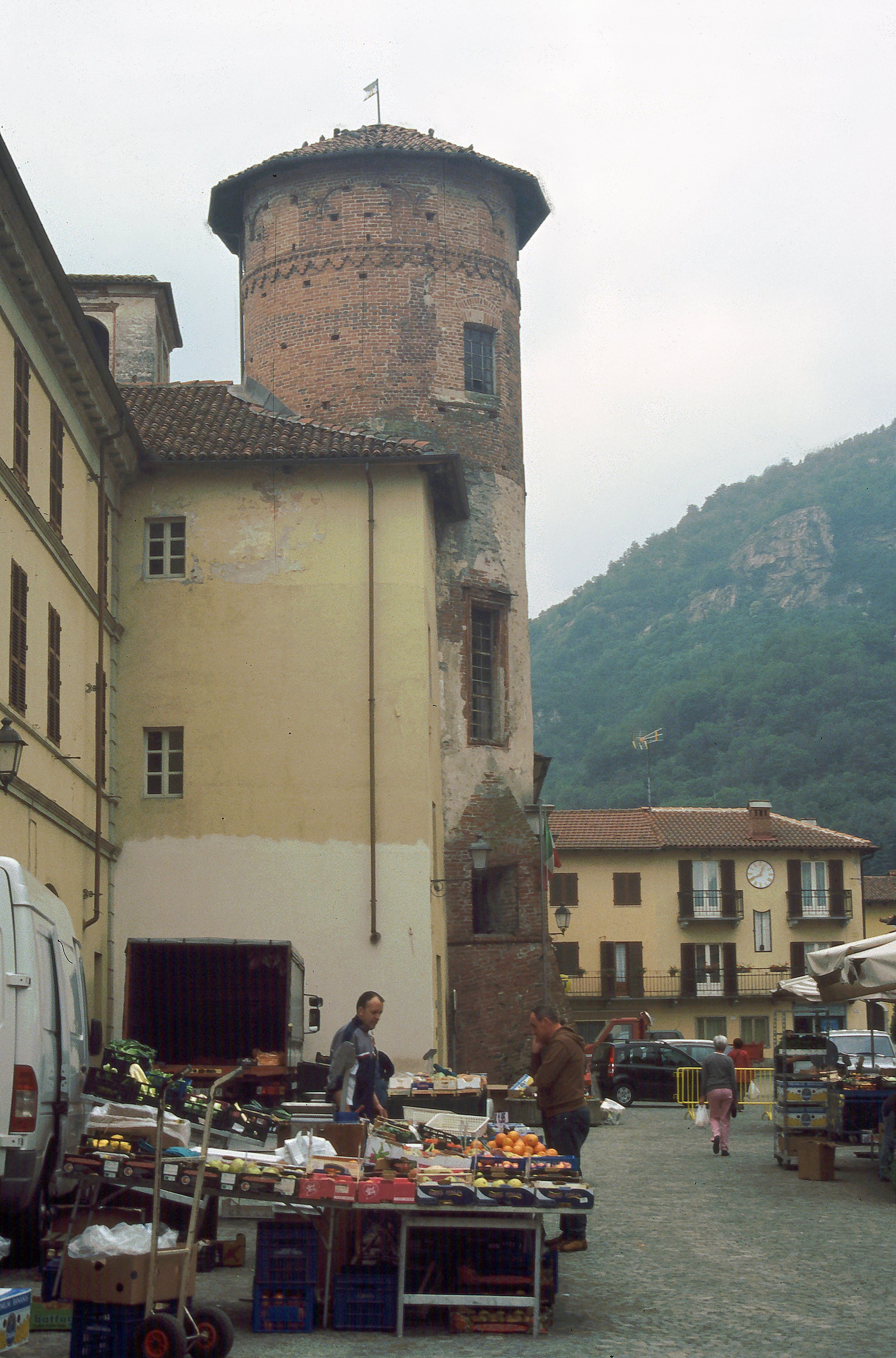 Revello